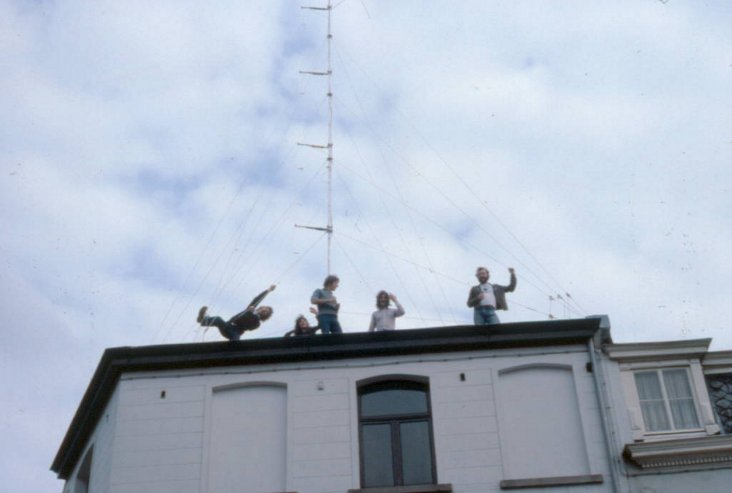 installation de l'antenne de Radio z’Alternatives Bruxelles, 1979, Radio libre en Belgique, Association pour la libération des Ondes - Belgique